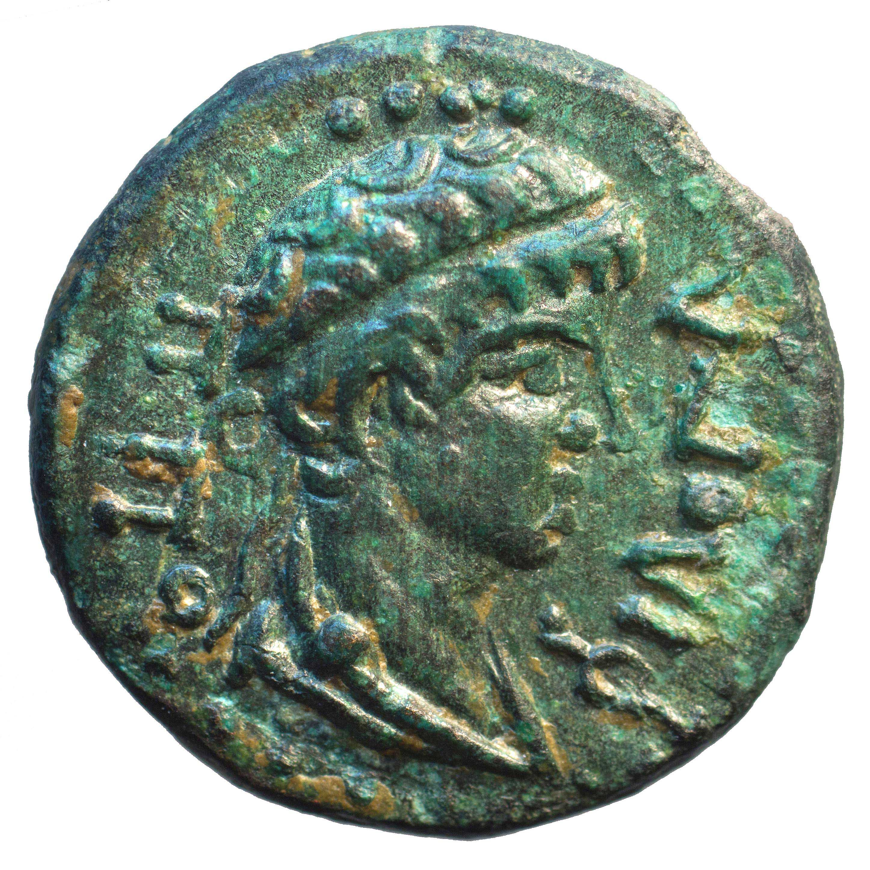 Bronzemünze des Philopappos aus Selinus-Kilikien-14mm, circa 72 n. Chr.